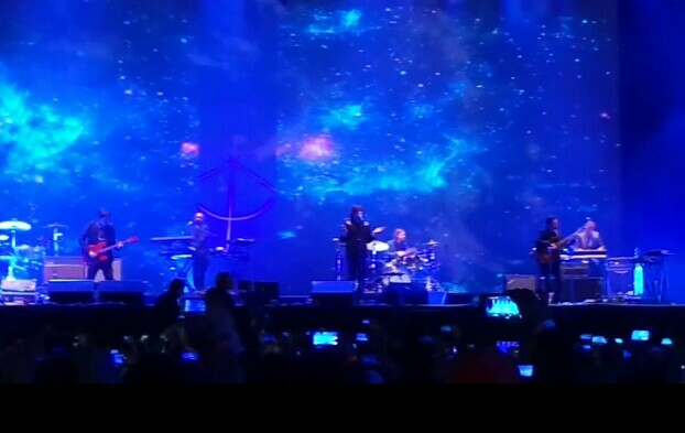 Zoé en el Foro Sol (8.11.14)